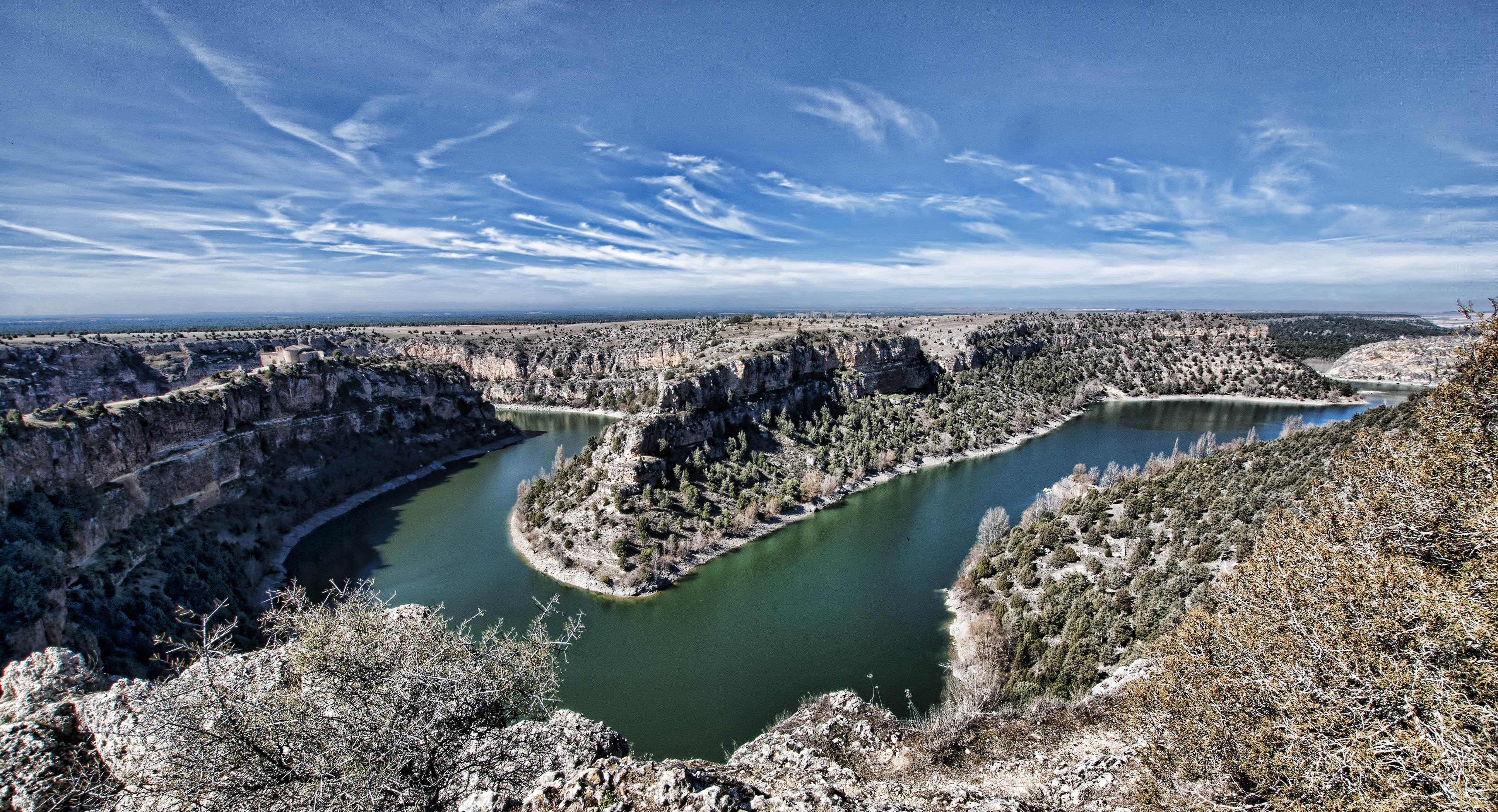 Parque Natural de las Hoces del Rio Duratón, Spain/Espana Duraton's Gorges / Hoces del Duraton